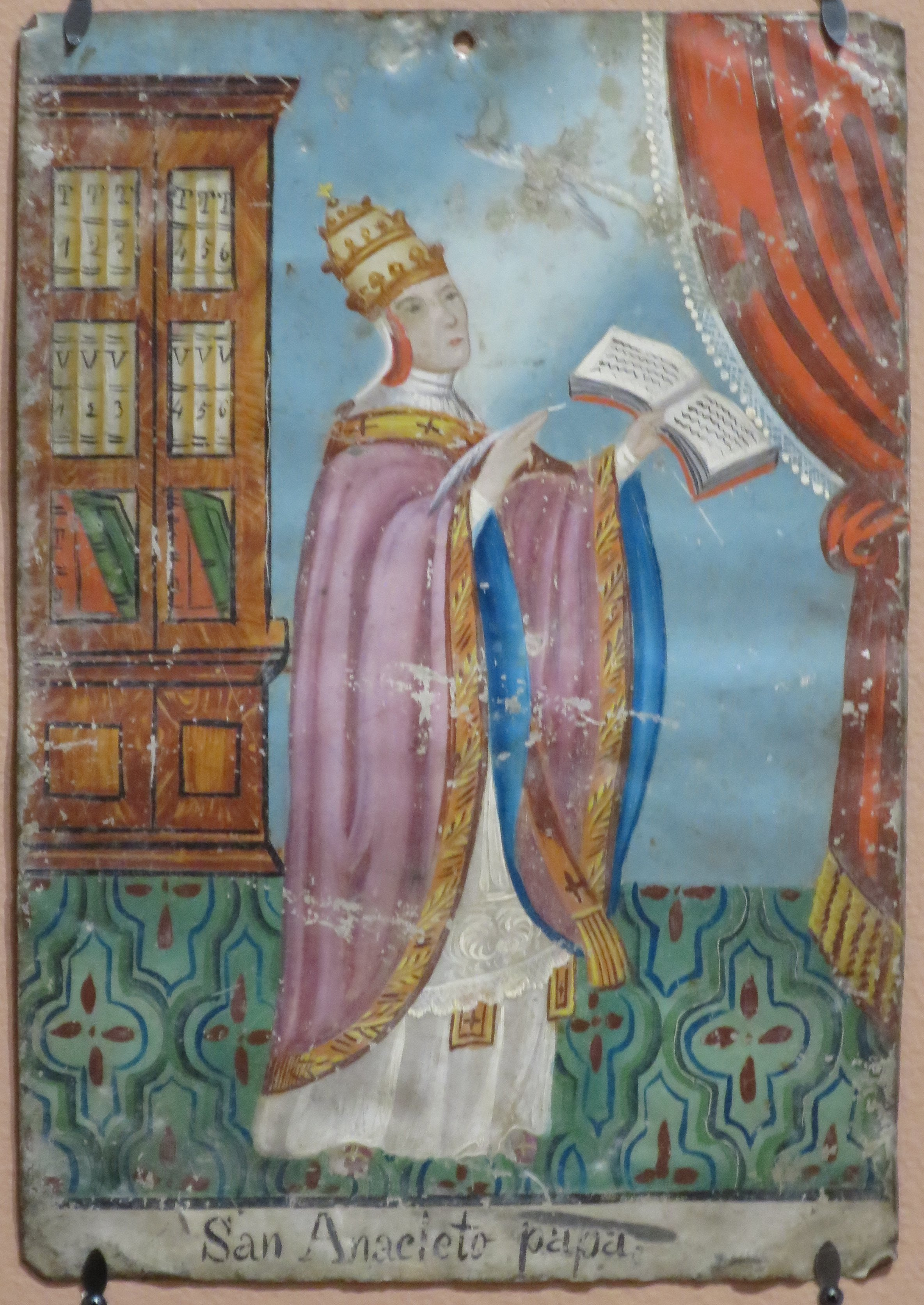 retablo